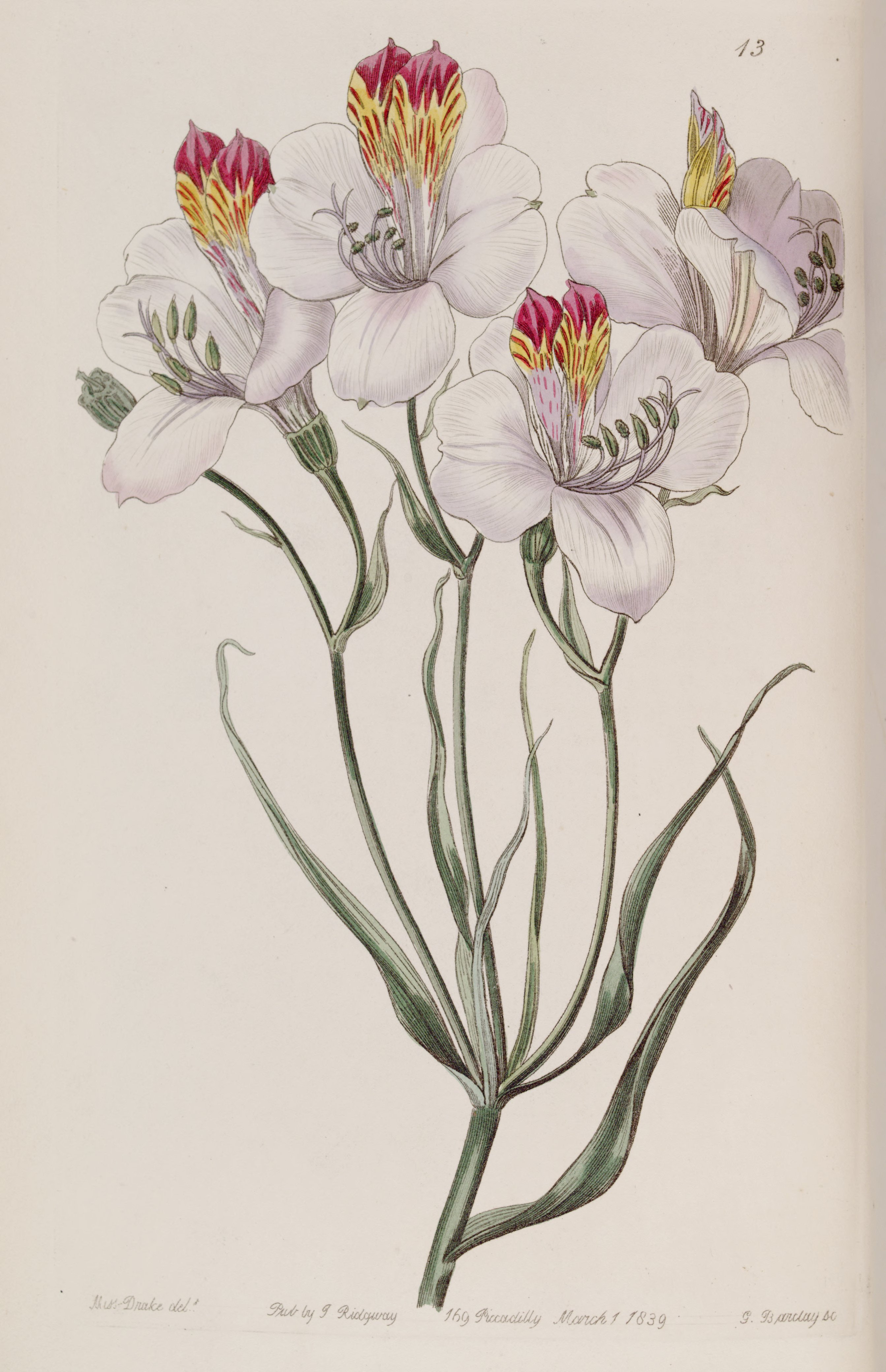 Alstroemeria ligtu subsp. ligtu